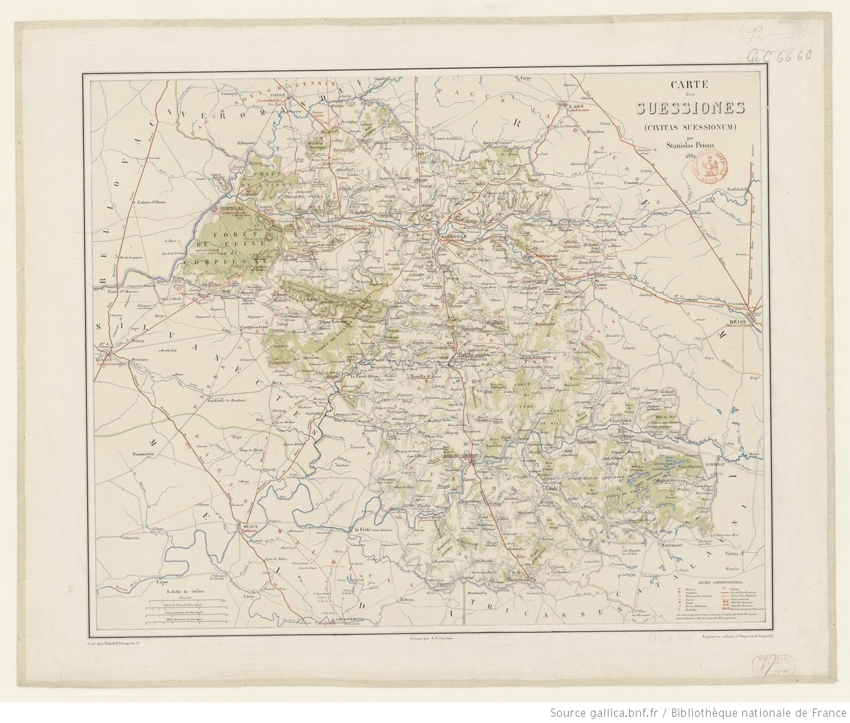 Cartes des Suessiones par Stanilas Prioux